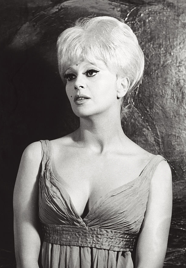 Franca Rame, Rome